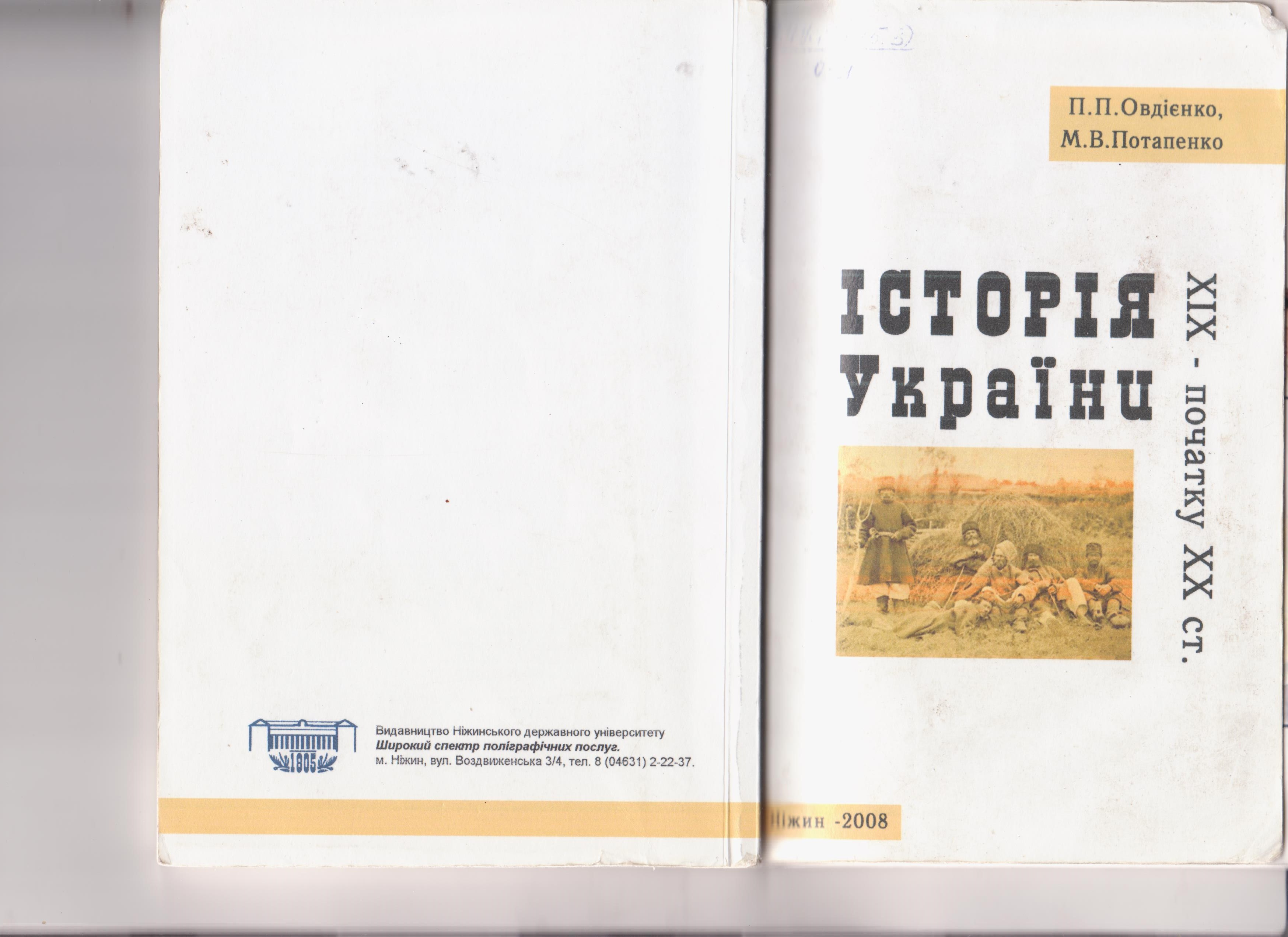 фото